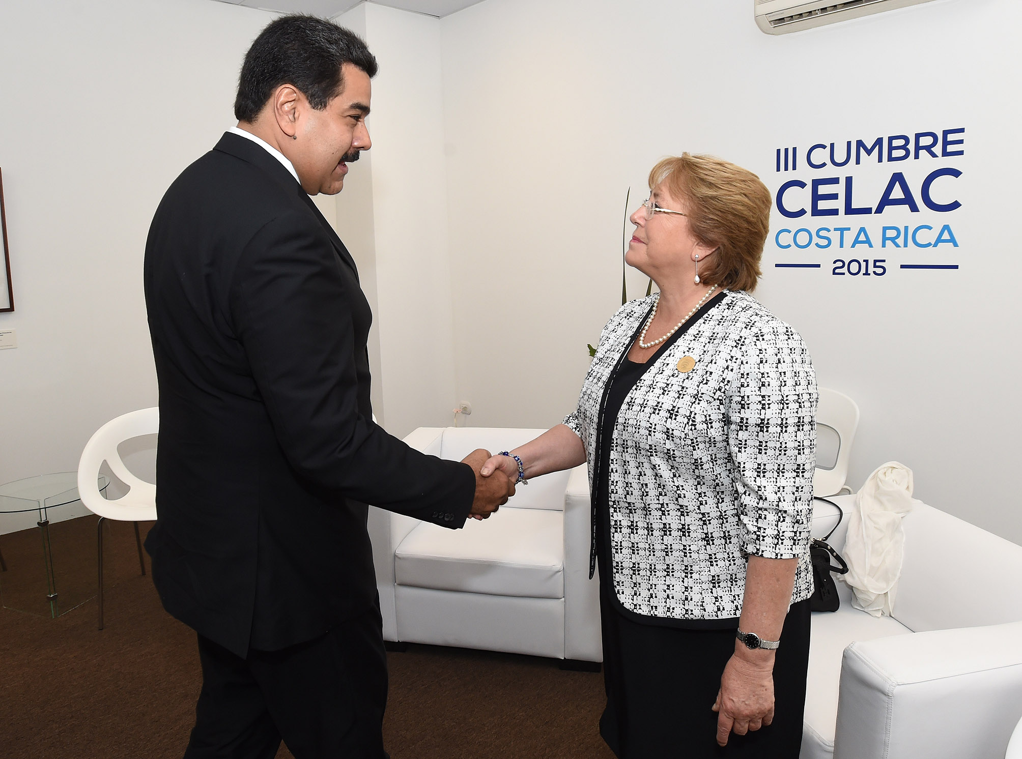 Gobierno de Chile